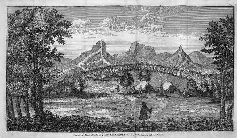 [Illustrations de Voyage autour du monde] Auteur : George Anson Éditeur : Henri-Albert Gosse et Compagnie (Genève) 1750